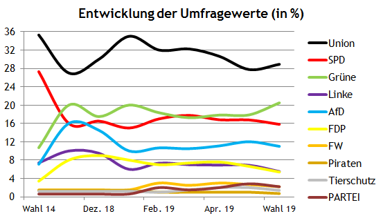 Europawahl-Umfragen Deutschland 2019